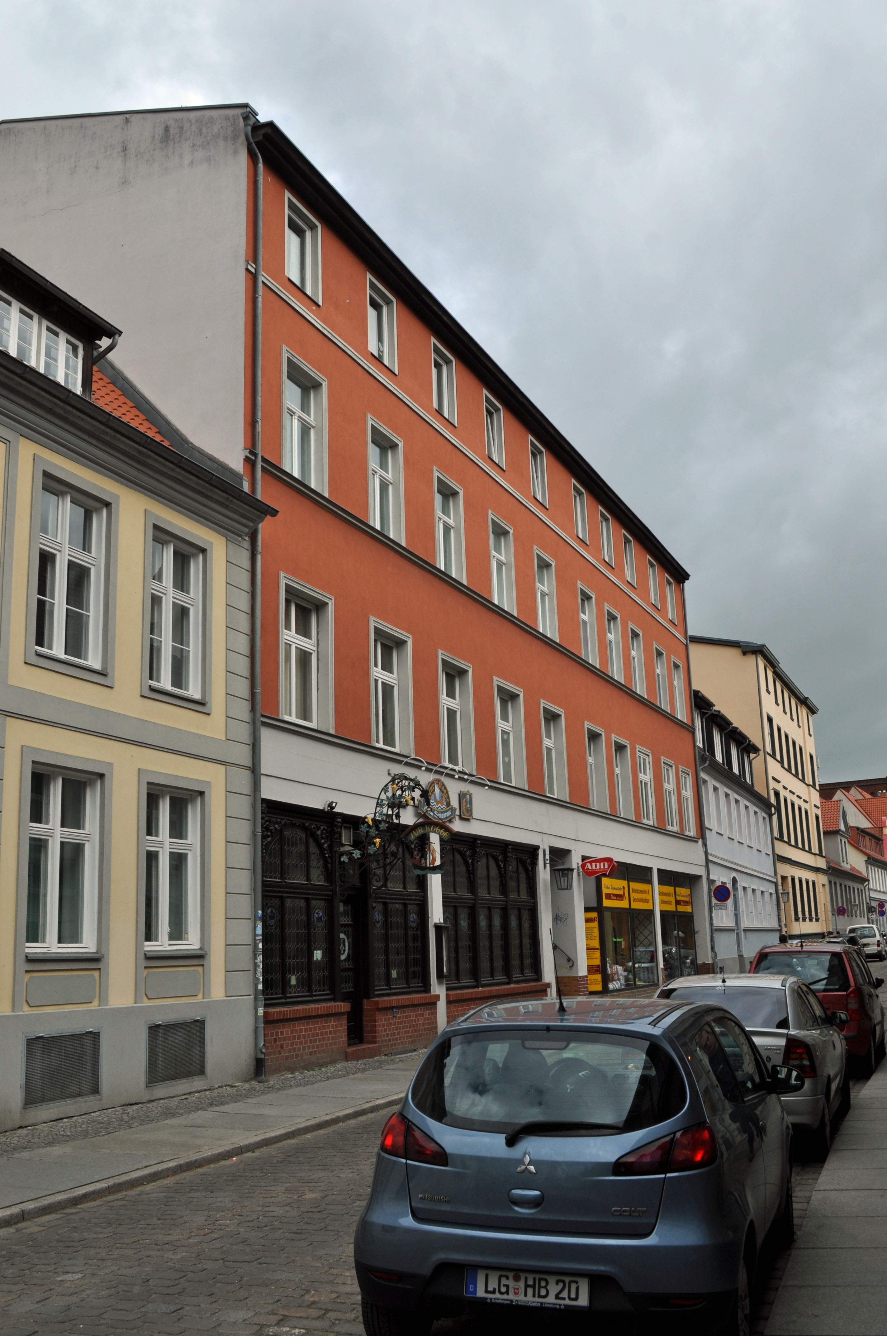 Gebäude in Stralsund, siehe Dateiname